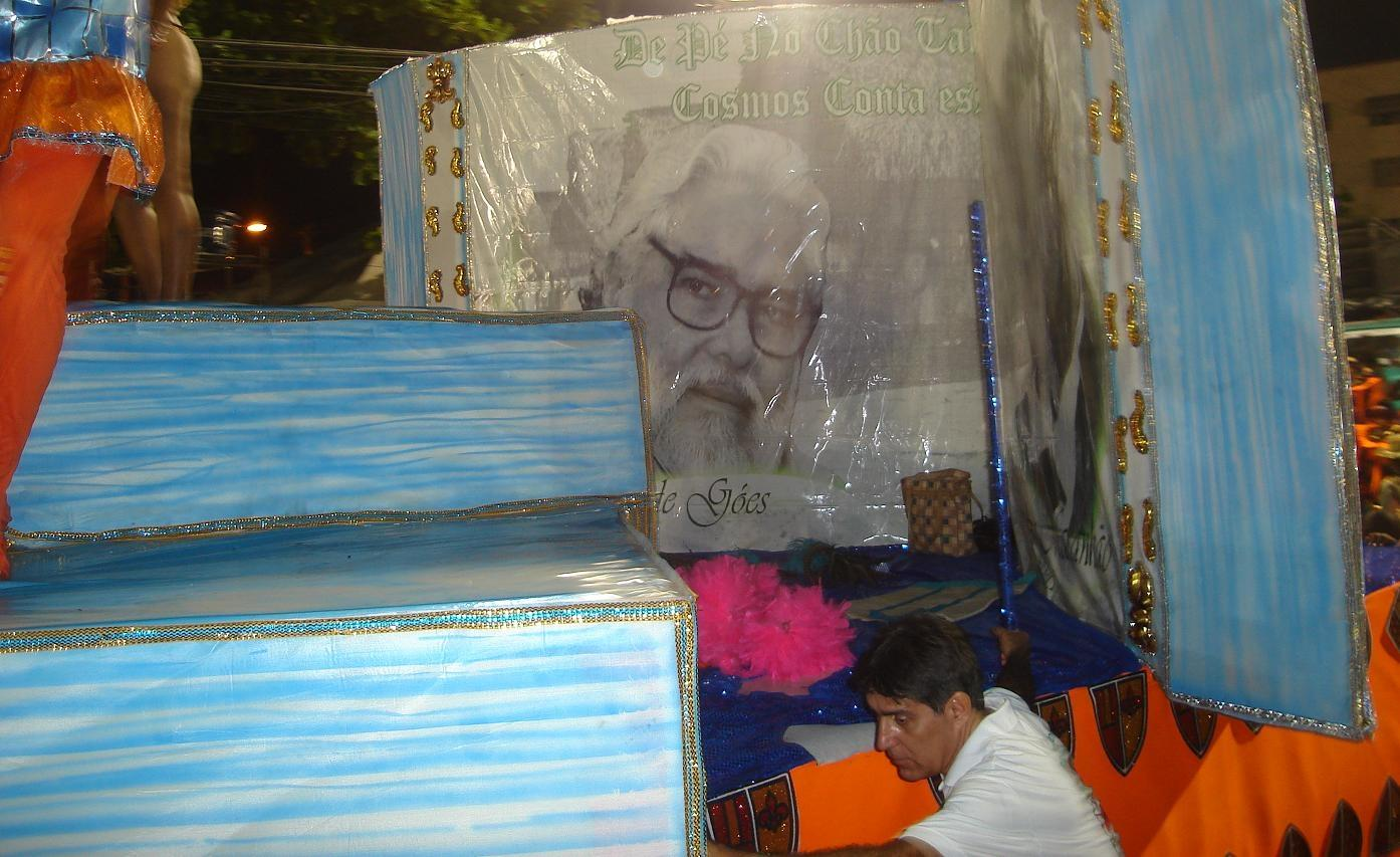 GRES Unidos de Cosmos, 2010, último carro alegórico, com a foto de Moacyr de Goés, homenageado no enredo "De pé no chão também se aprende a ler, Cosmos conta essa história popular".